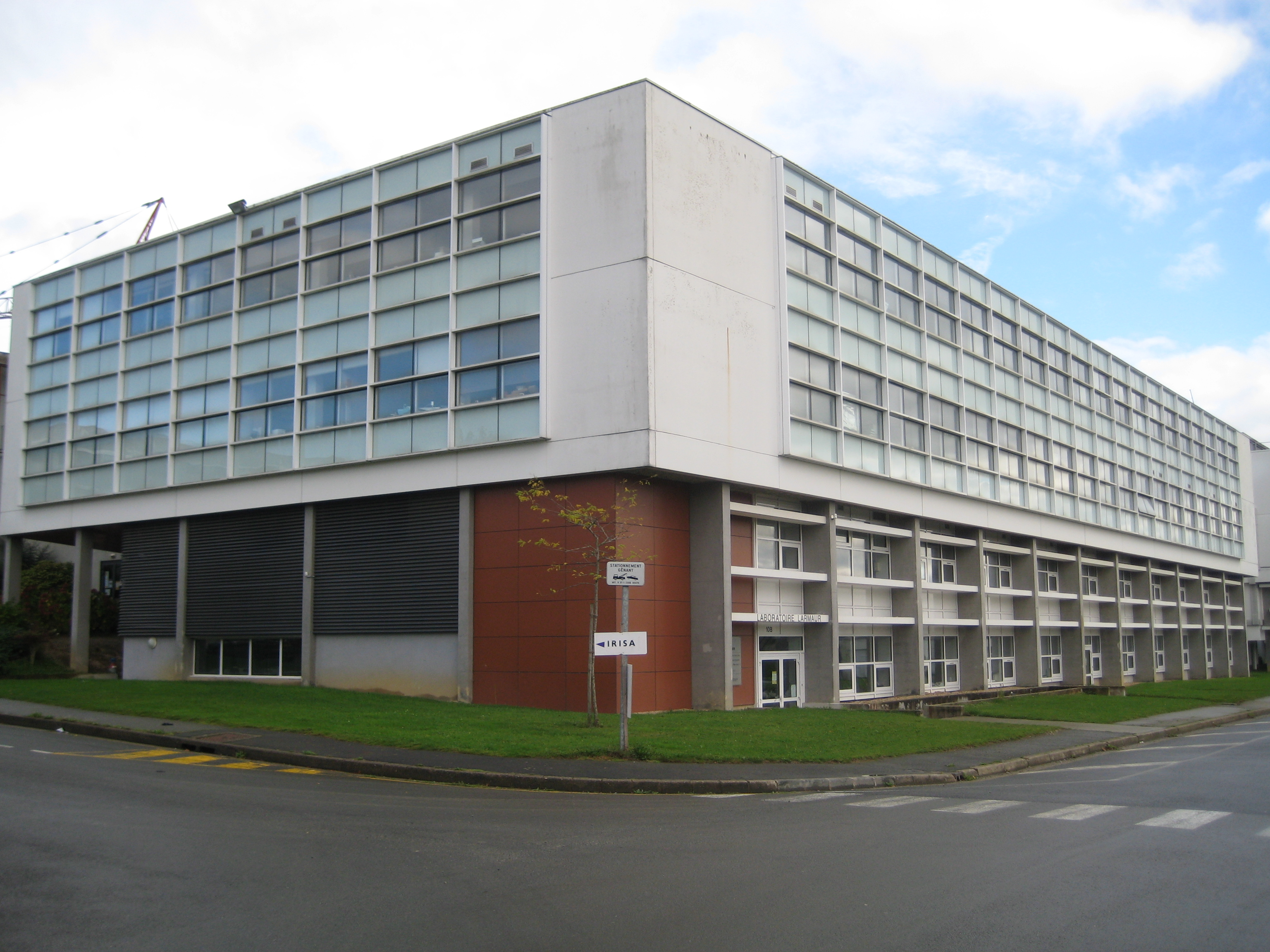 LAboratoire de Recherche en Mécanique Appliquée de l'Université de Rennes 1